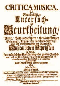 Mattheson strona tytułowa jego Critica musica. Źródło